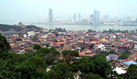 Die Insel Gulangyu